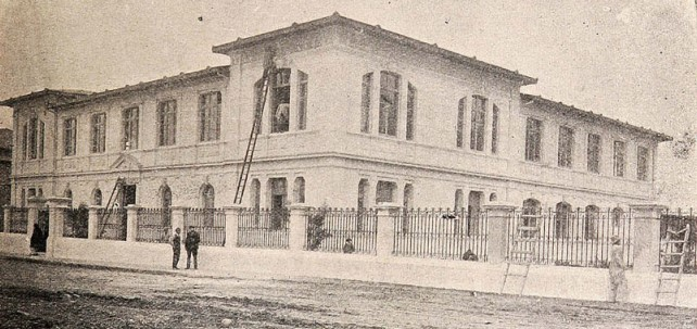 Edificio de la Escuela de Dentística, Santiago, Chile.